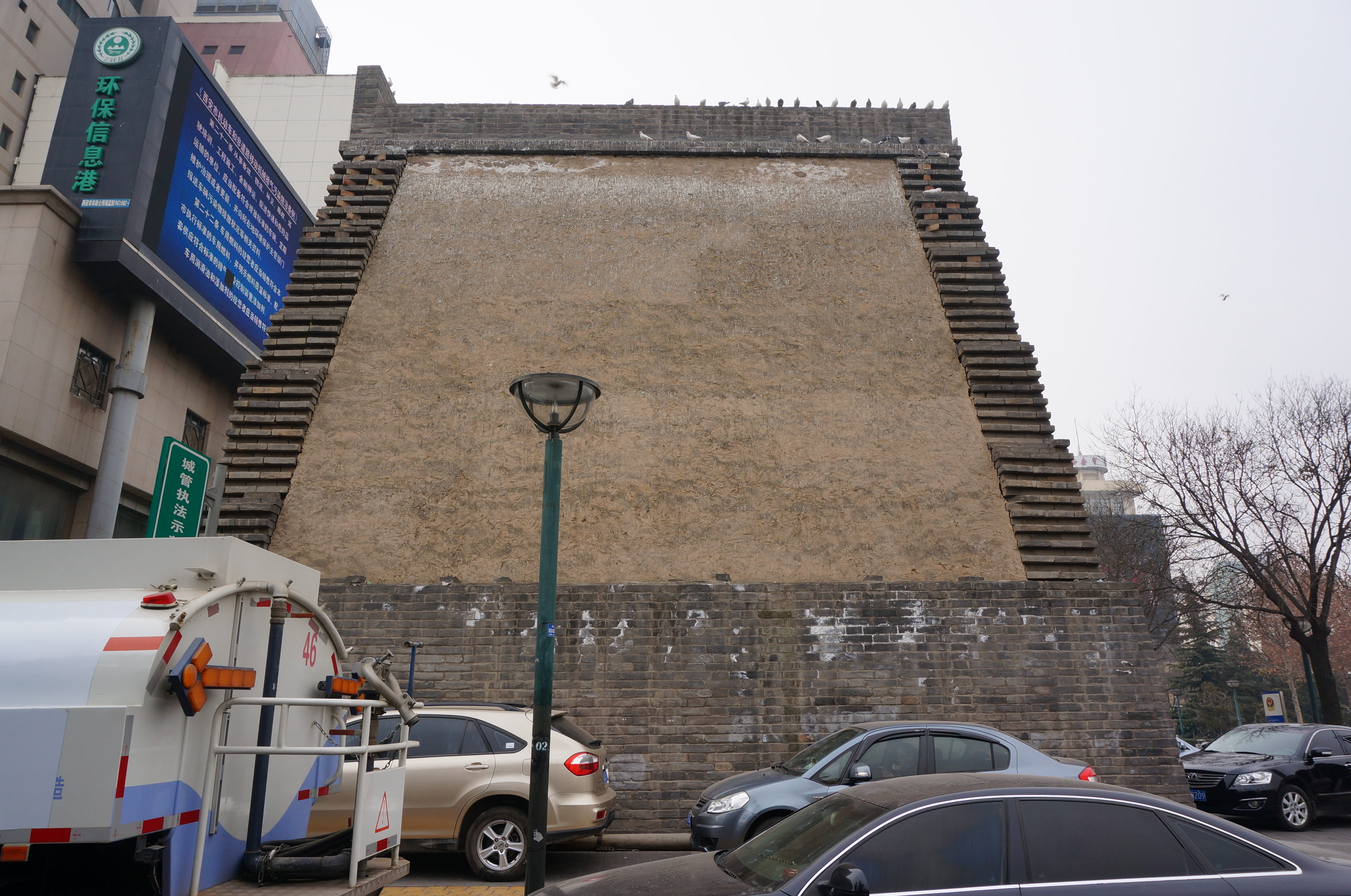 明秦王府城墙遗址，西段（新城广场西南侧）东侧。